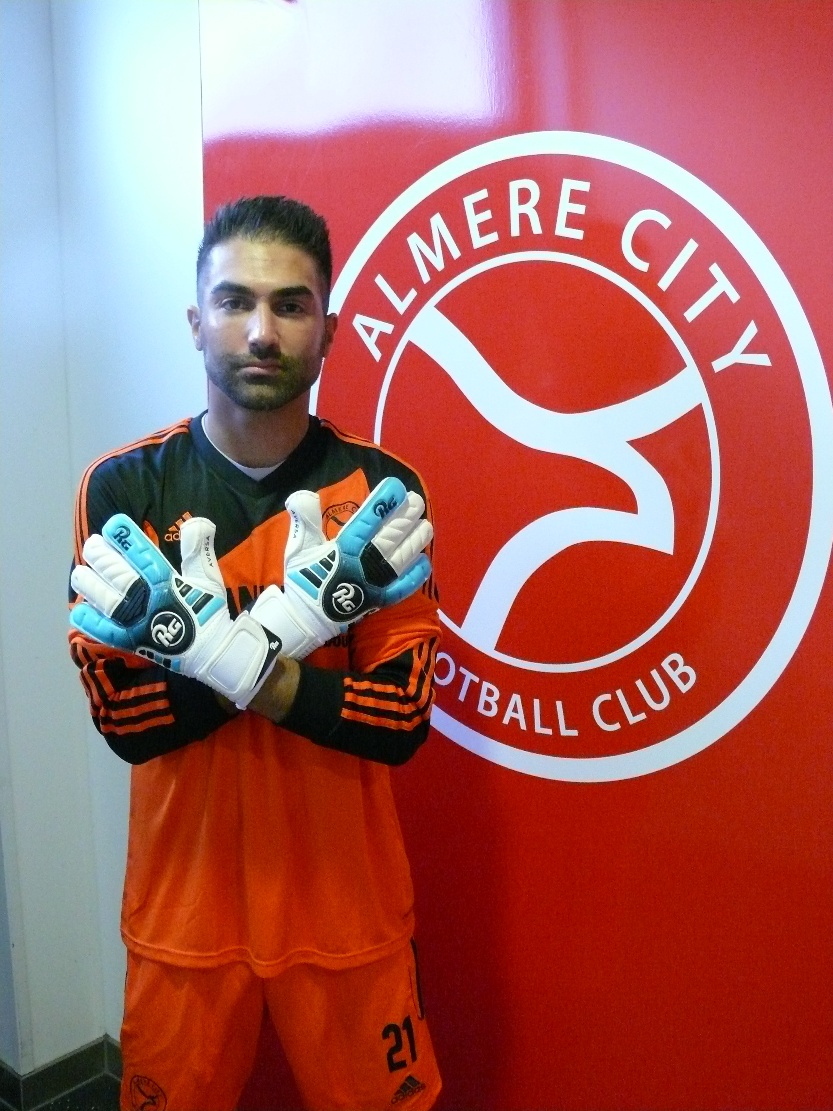 Agil Etemadi hier te zien met zijn nieuwe keepershandschoenen verkregen via